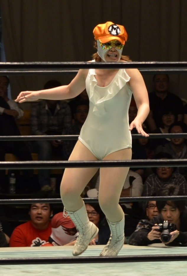 ヤッペーマン3号